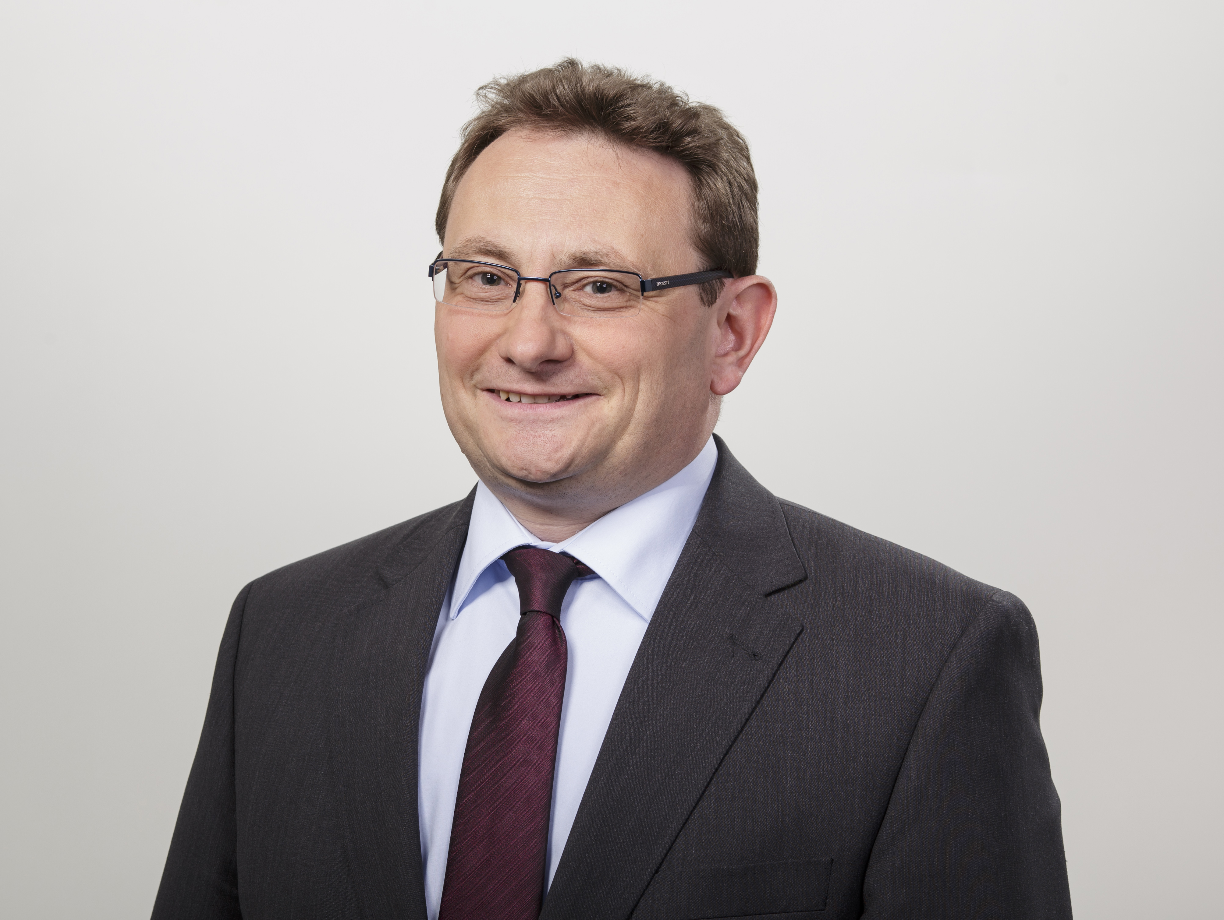 Ulrich Lange, MdB (2012)